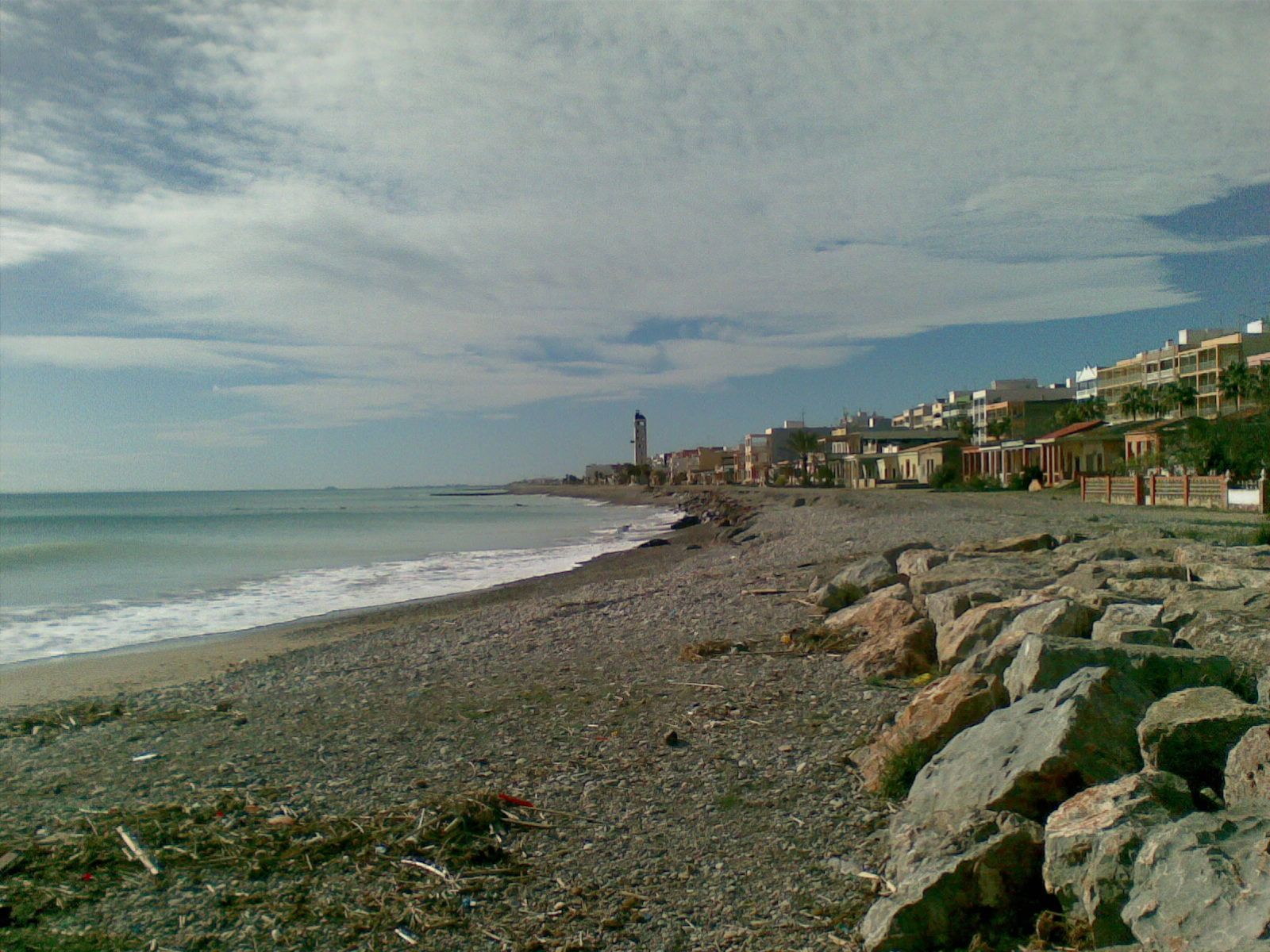 Invierno en la playa de Nules (Castellón)